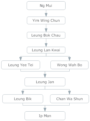 Eget billede lavet for at illustrere linien af tidlige Wing Chun udøvere.Pethol 31. aug 2011, 08:14 (CEST)